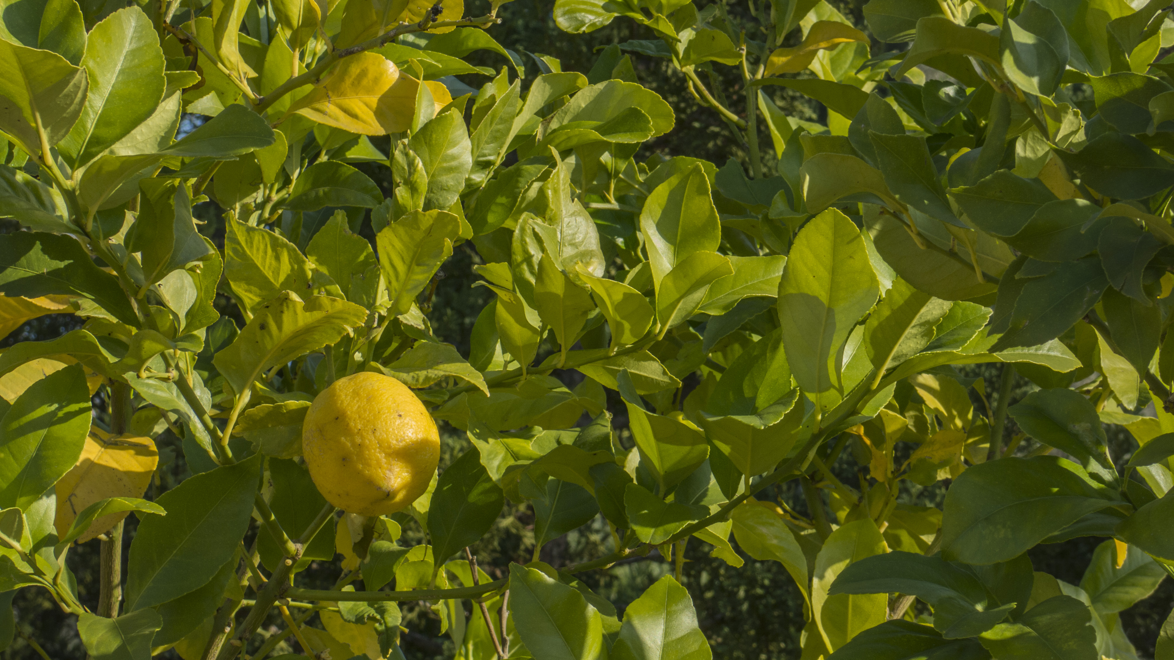 Municipi de Mallorca situat al centre de l'illa.